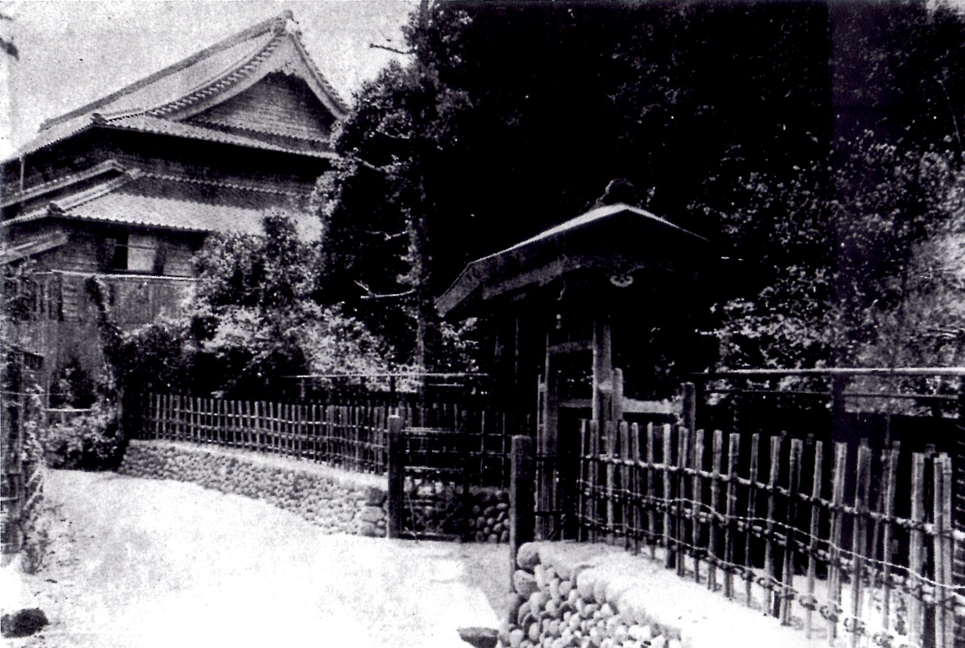 1918年（大正7年）創設の劇場「大黒座」。愛知県刈谷市。